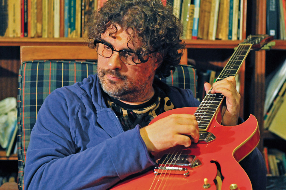 Santiago Tavella en su casa